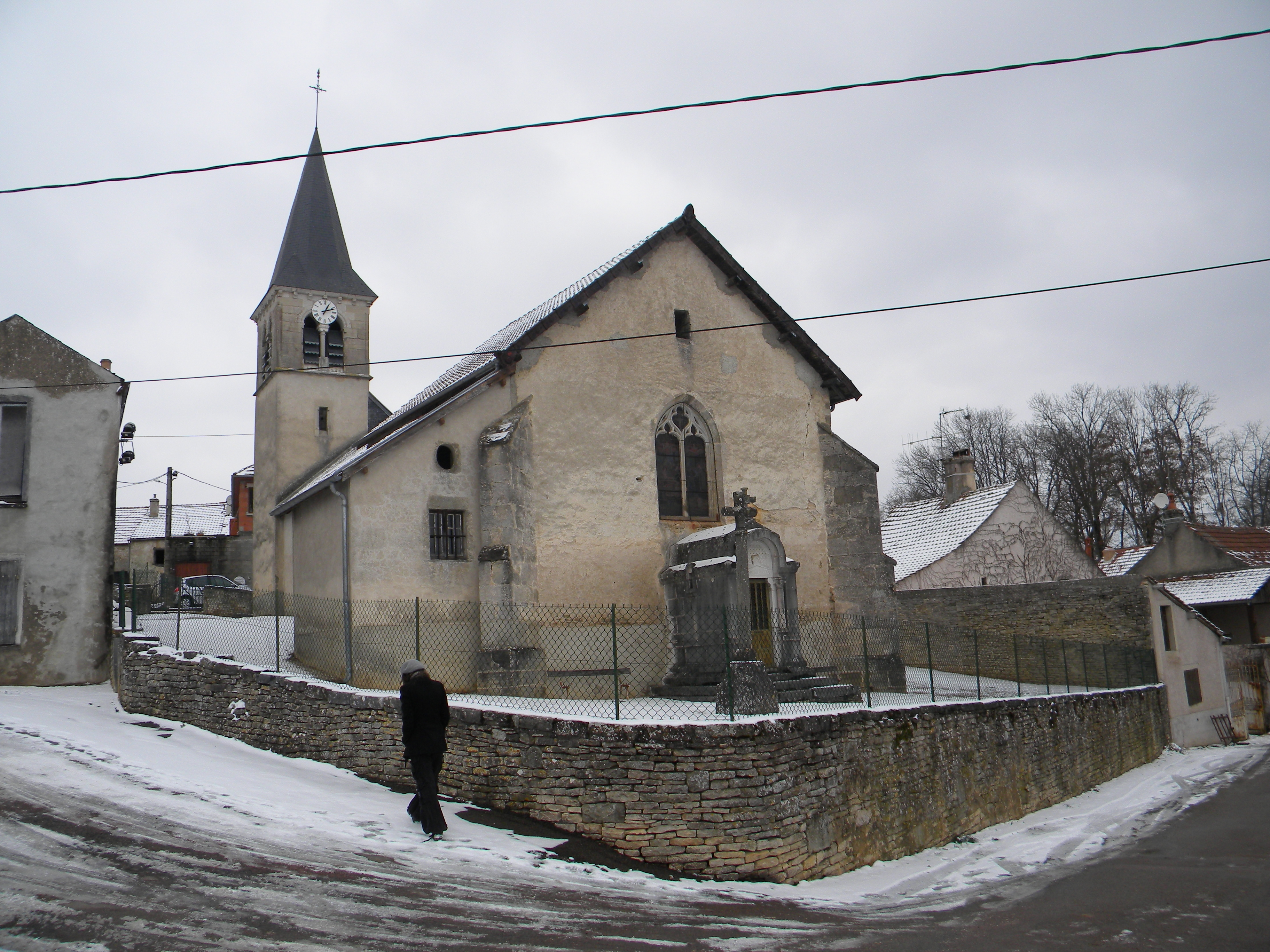 Kirko de Bouze-lès-Beaune